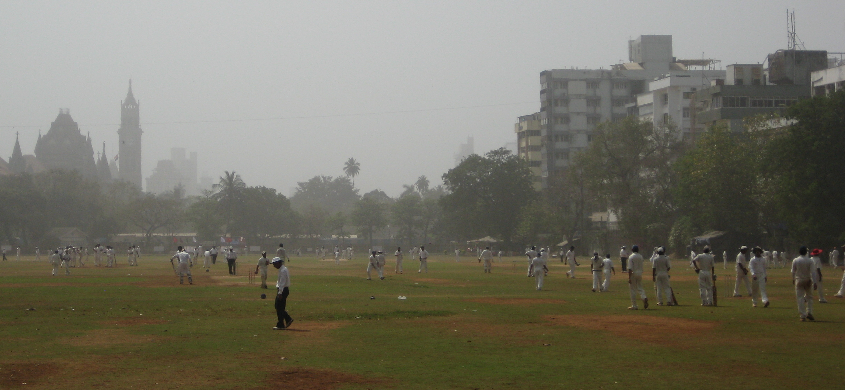 Cross Maidan in Mumbai